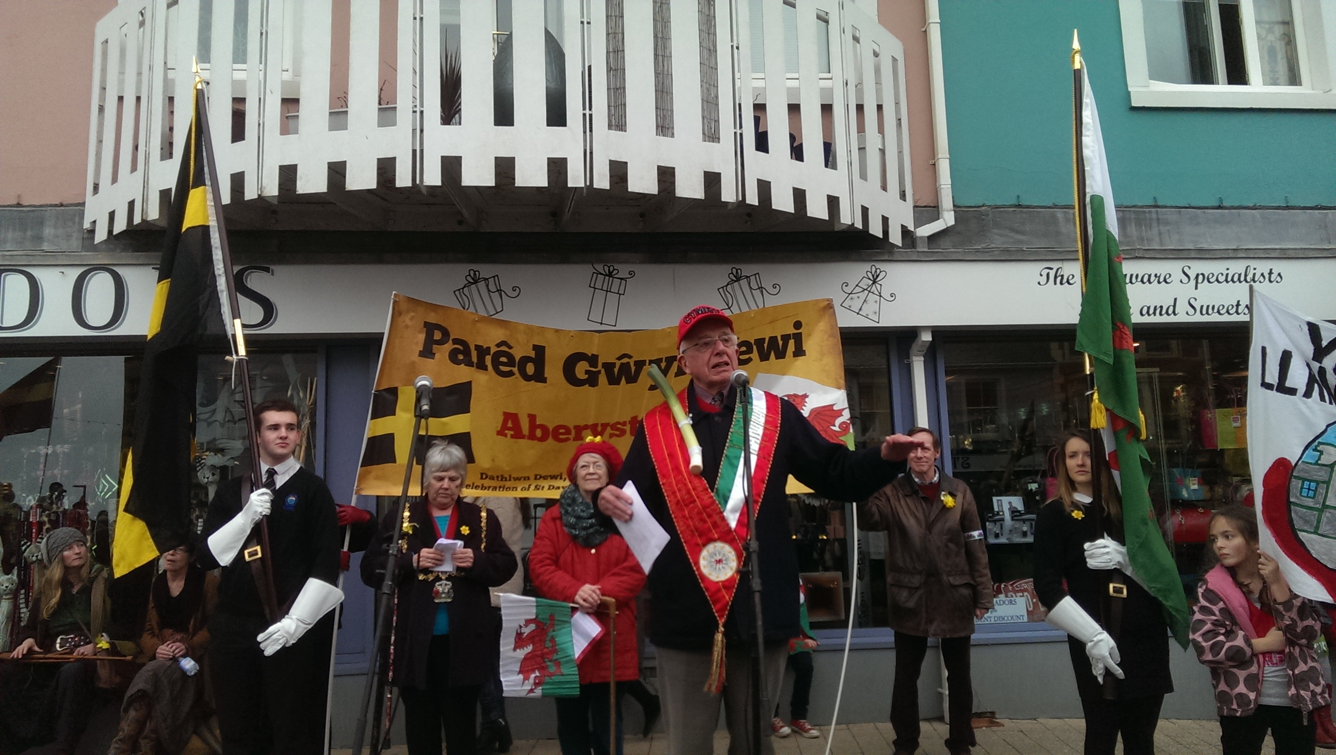 Gerald Morgan, Parêd Gwyl Dewi Aberystwyth 2015